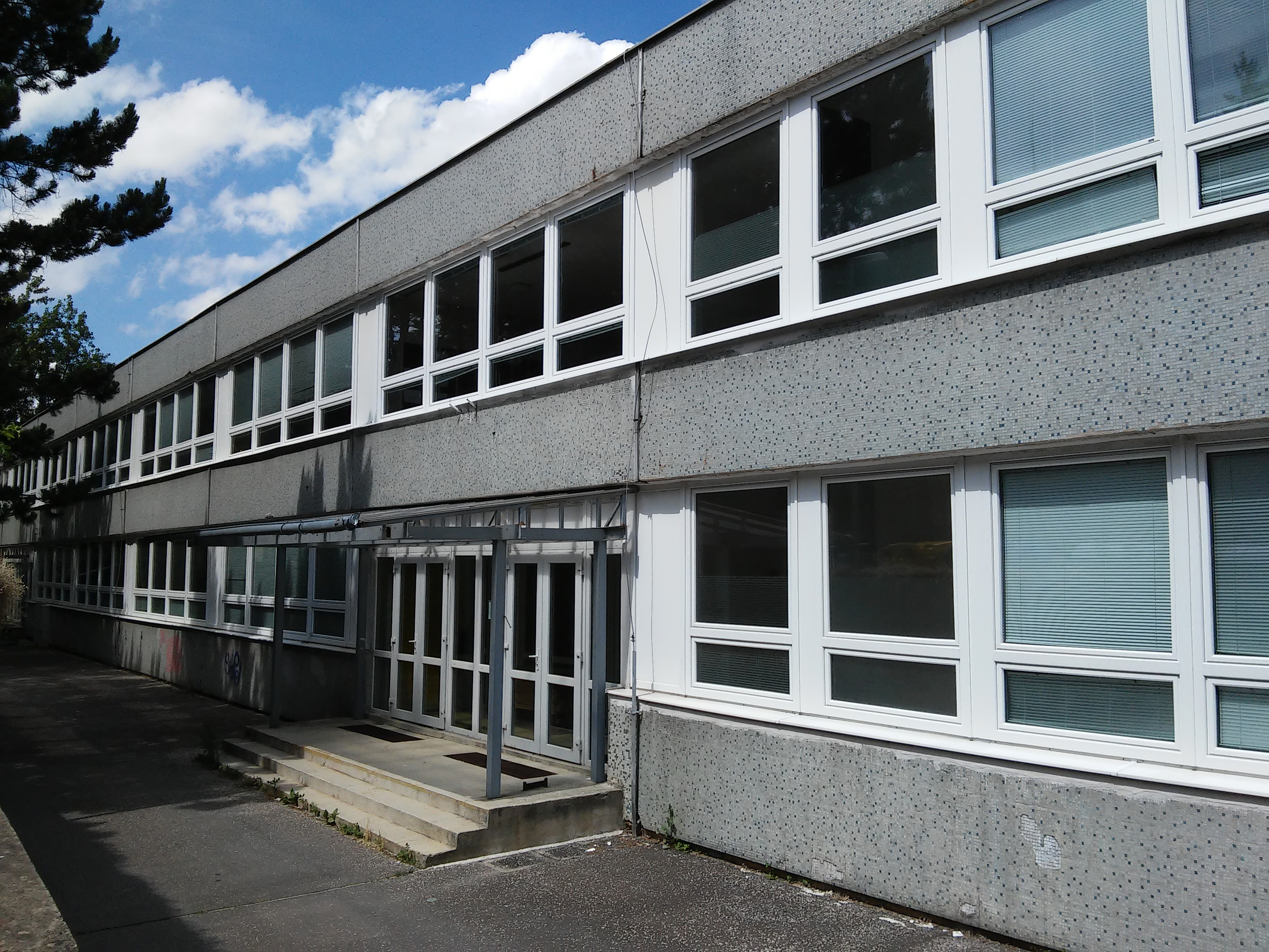 Sokolíkova 2, Dúbravka, Bratislava